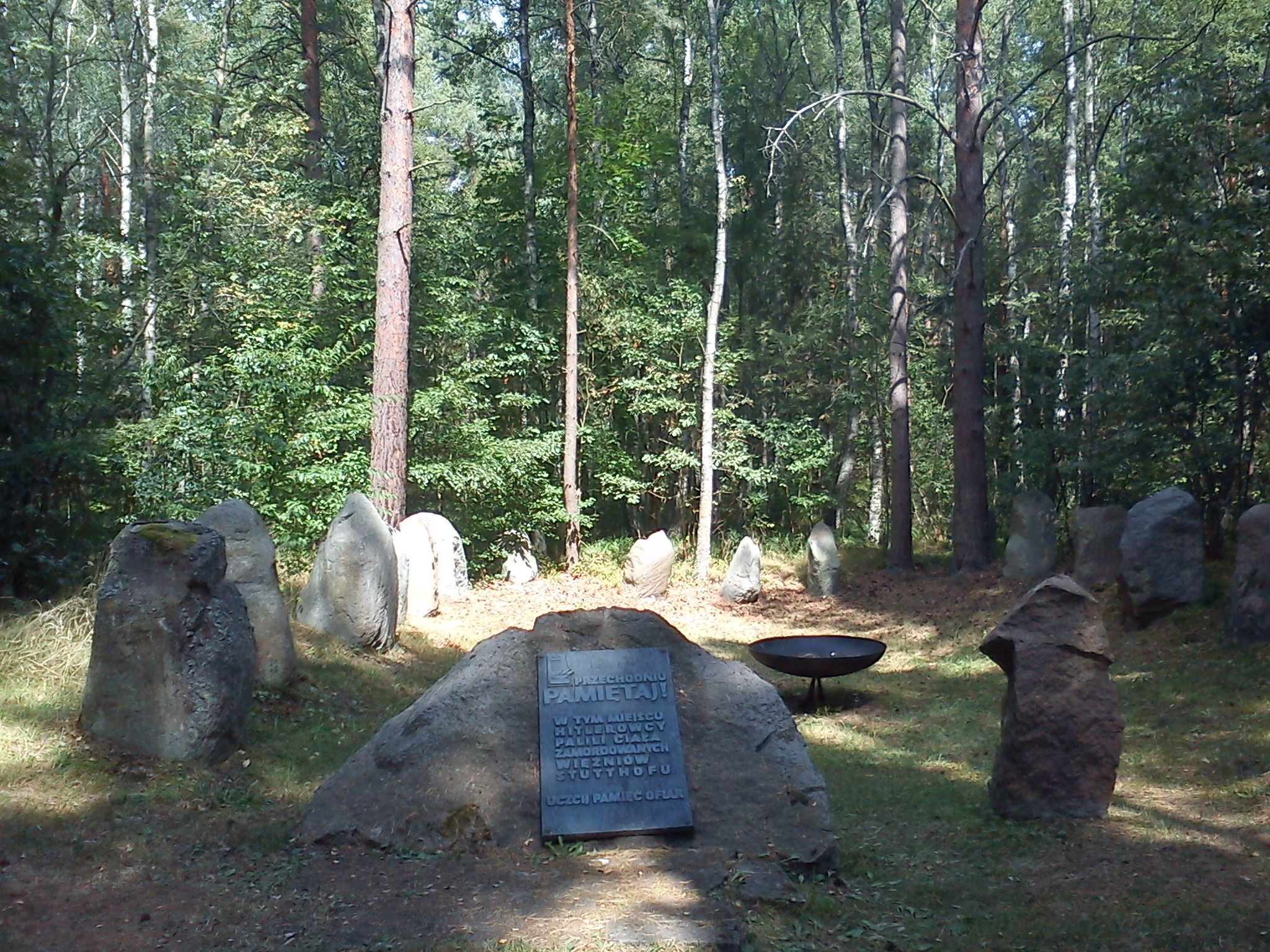 Stos całopalny - Stutthof KL. Używany w celu odciążenia głównego krematorium podczas epidemii tyfusu na przełomie 1944 i 1945. Położony w lesie, dość daleko od obozu, w okolicy nowej kuchni.